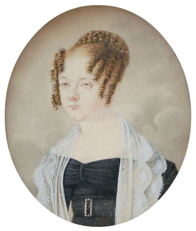 Графиня Прасковья Александровна Гендрикова (1803-1843), урожденная княжна Хилкова.